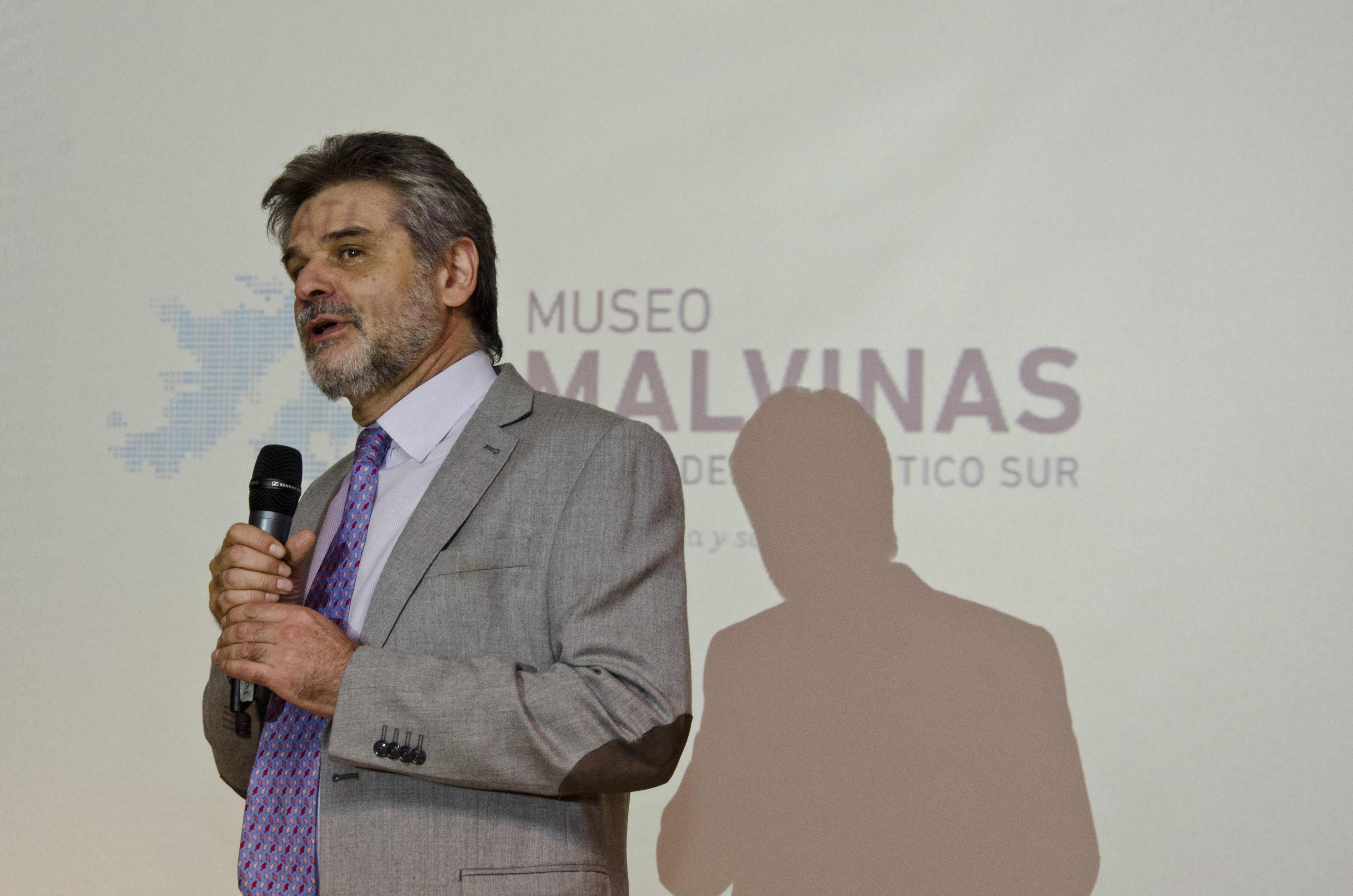 ​Buenos Aires, 30 de julio de 2014 - ​El Museo Malvinas e Islas del Atlántico Sur​, del Ministerio de cultura de la Nación, realizó un acto en el que se descubri​ó la Bandera Patria Mía que recorrió todo el territorio nacional hasta llegar a ​las Islas Malvinas en septiembre del 2013​: se expone un fragmento de esta bandera de 200 metros que cruzó el país.​ Estuvieron presentes Maridel Cano y Abel Acevedo, autores de la obra; el intendente de La Costa Juan Pablo de Jesús, el secretario de Asuntos Relativos a las Islas Malvinas, Daniel Filmus y el director del Museo Malvinas, Jorge Giles. Fotos: Romina Santarelli / Ministerio de Cultura de la Nación. ​.​